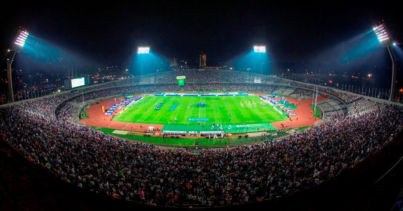 Estadio Olímpico Universitario UNAM